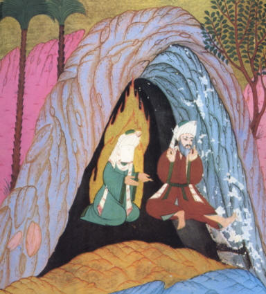 Abu Bakr und Muhammad finden Zuflucht in der Höhle Thaur (aus Siyer-i-Nebi 1595 n.Chr.)